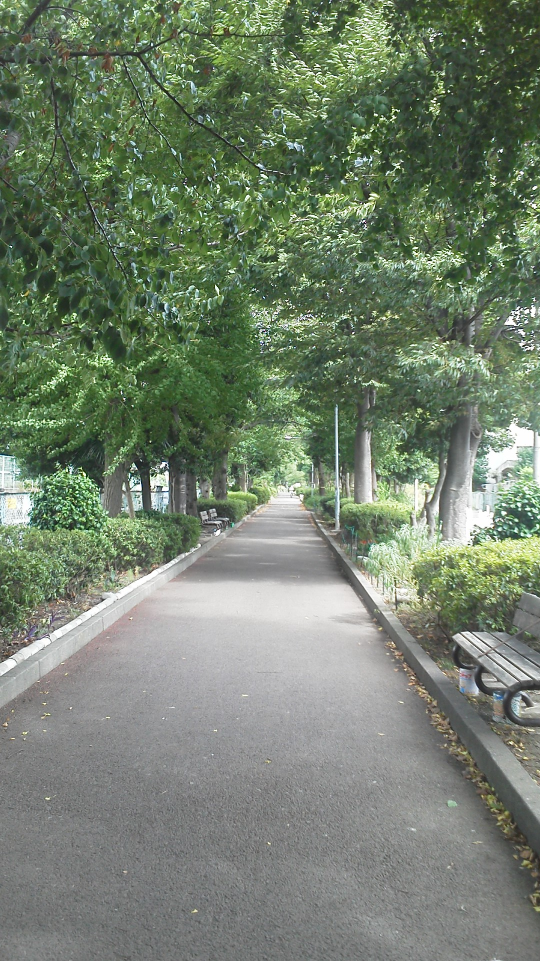 さいわい緑道（川崎河岸駅への貨物線の廃線跡）。